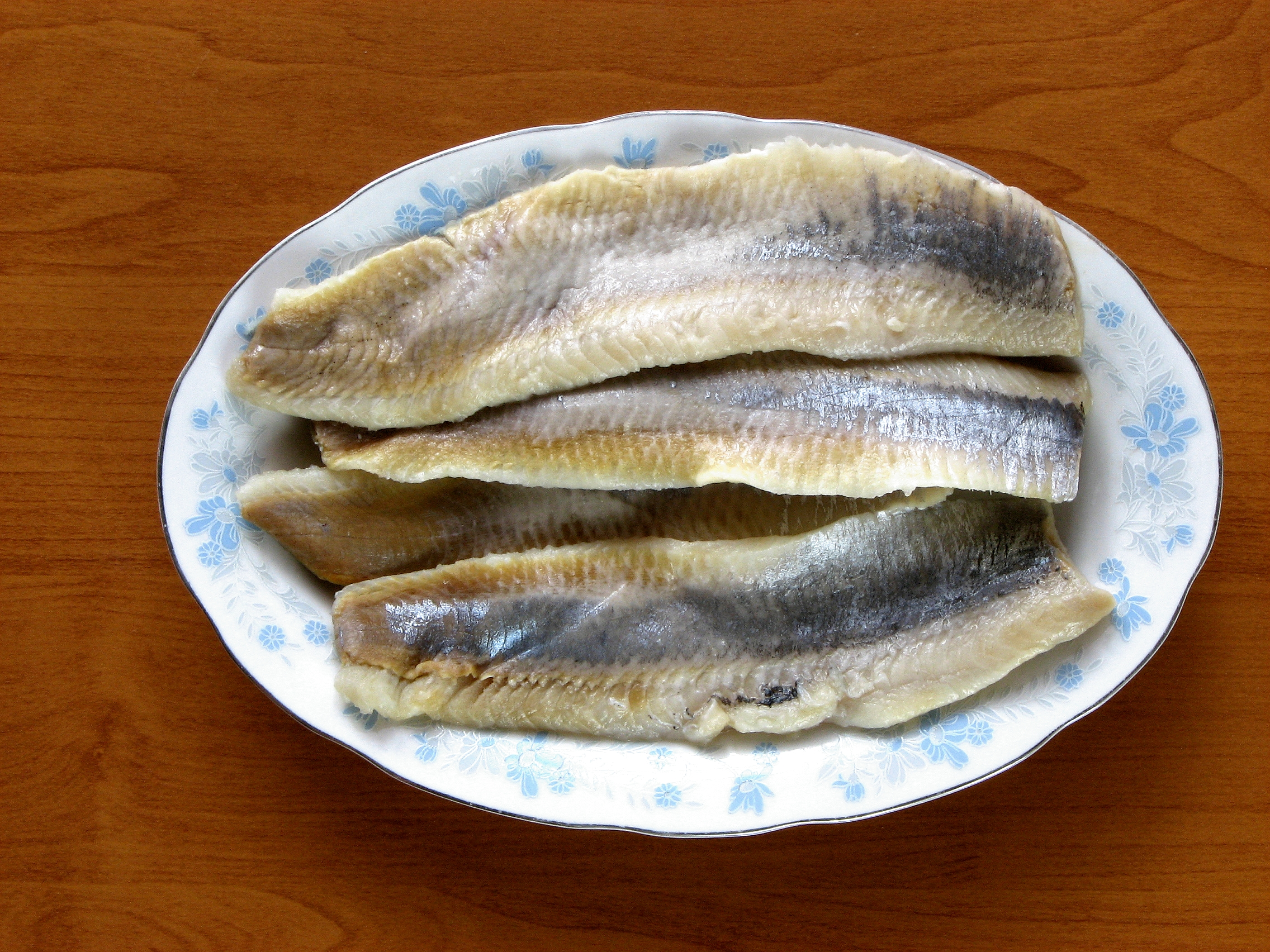 śledż, matias